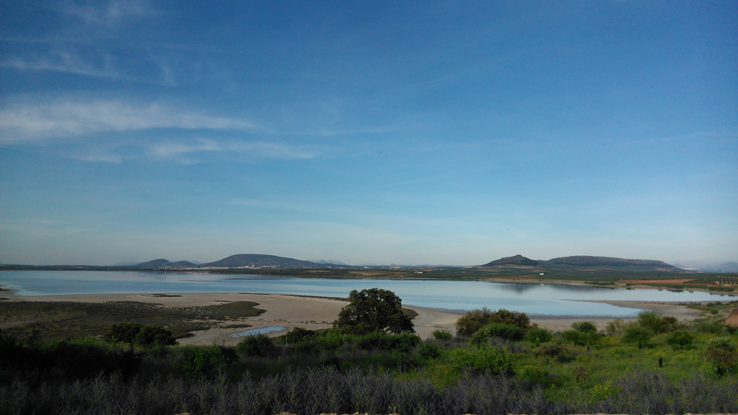 La laguna de fuente de piedra desde uno de sus observatorios This is a photography of a Site of Community Importance in Spain with the ID: ES0000033. Natura2000 entry, EEA entry